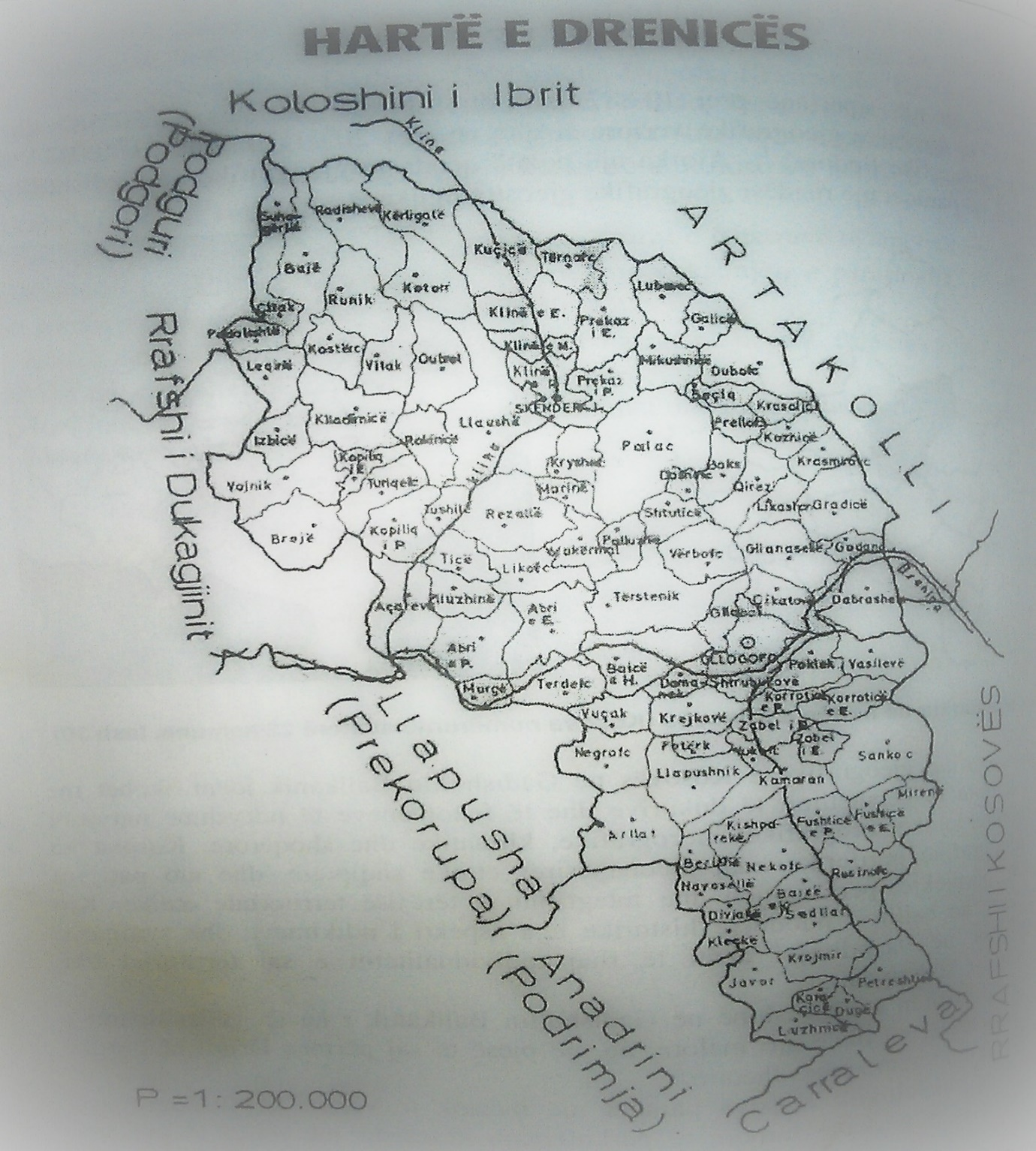 Pozita gjeografike e Drenices